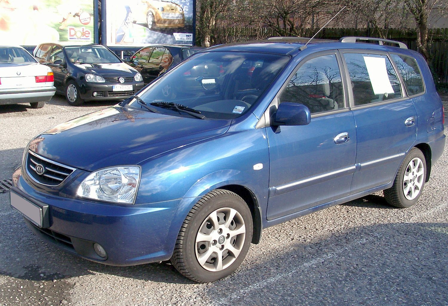 Kia Carens